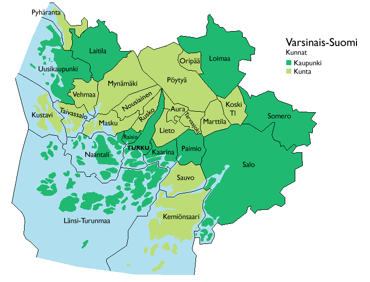 Kartta Varsinais-Suomen kunnista.